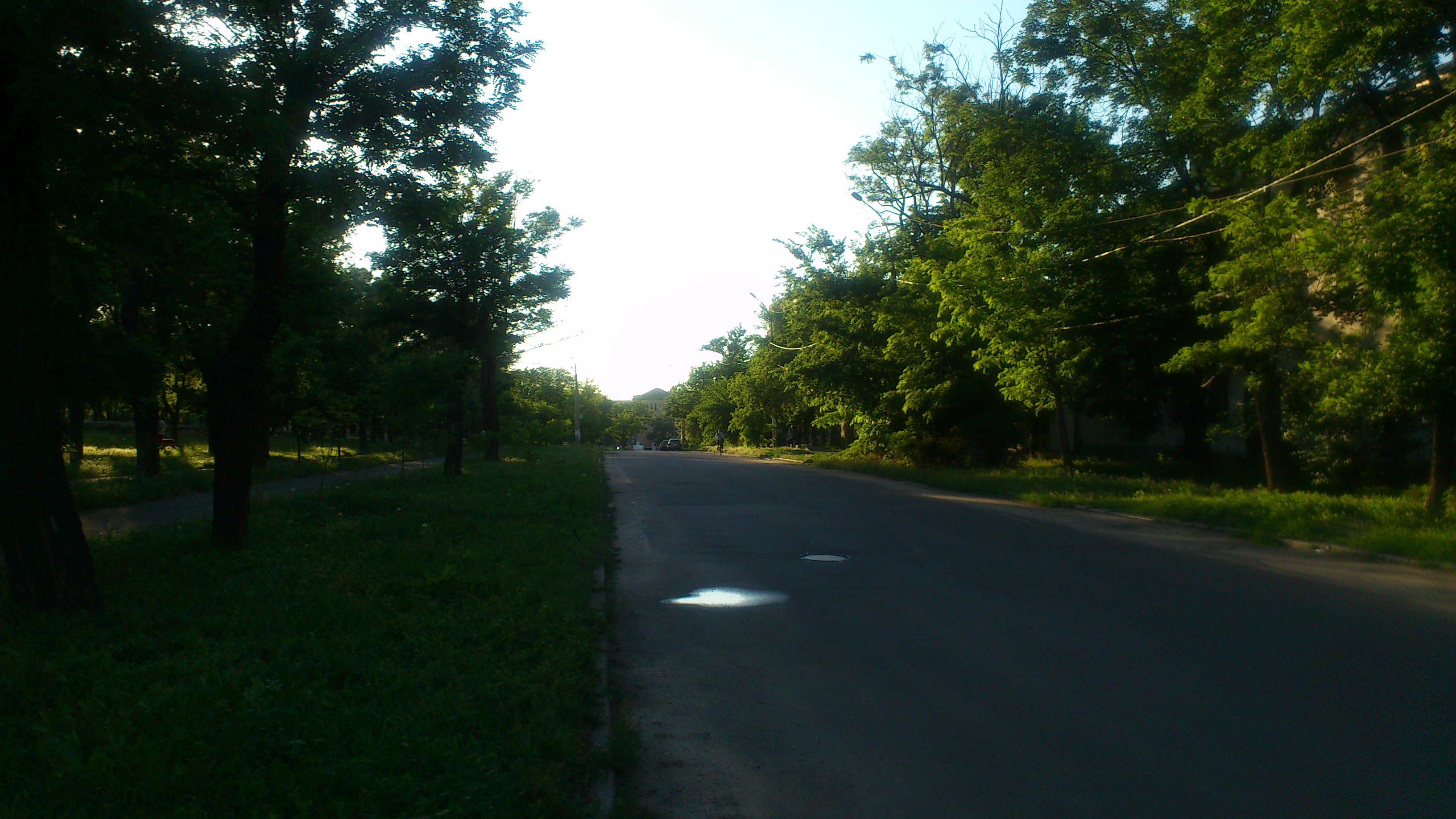 Вулиця Адмірала Макарова між скверами імені тараса Шевченка і Юних героїв